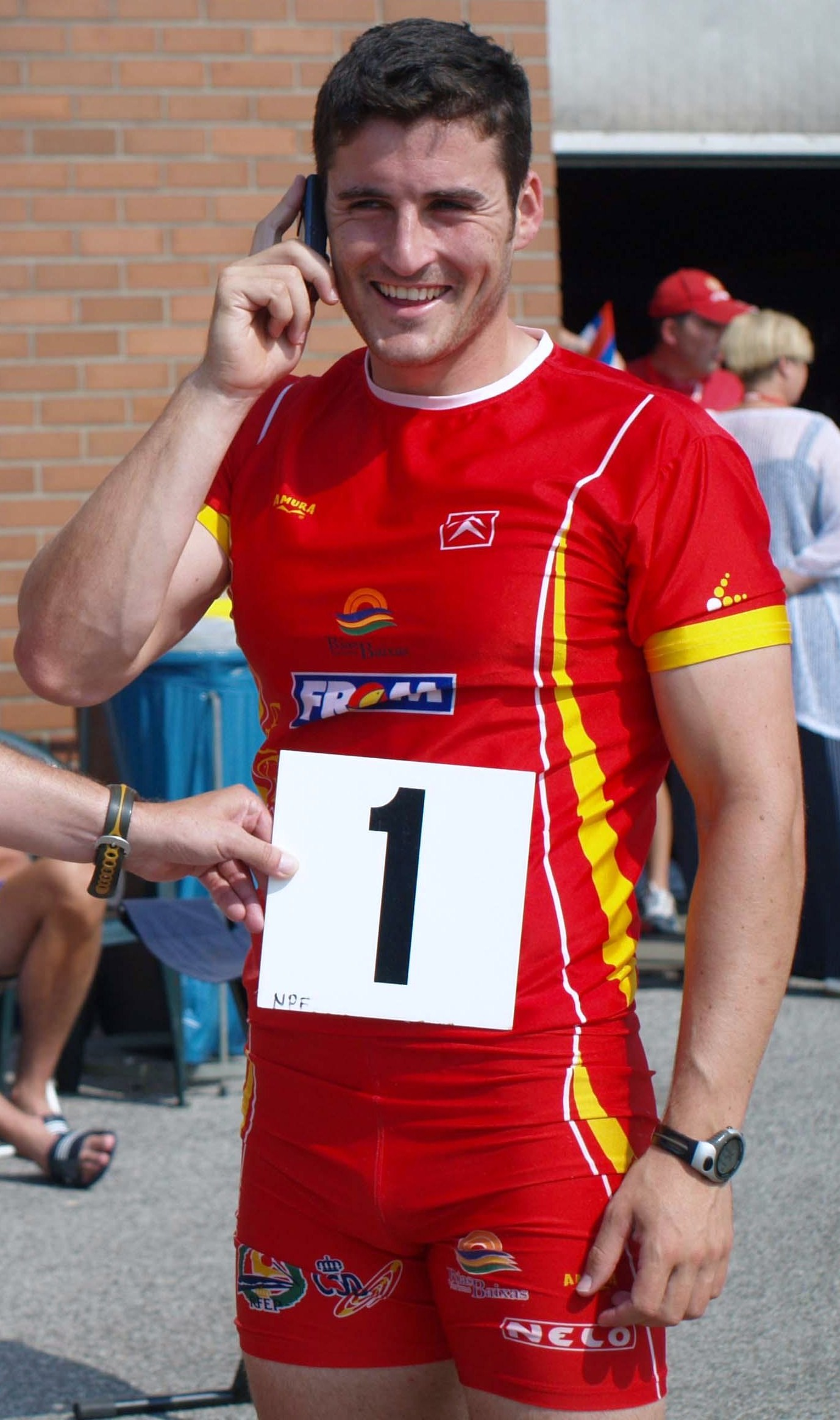 David Cal, Galician sprint canoer